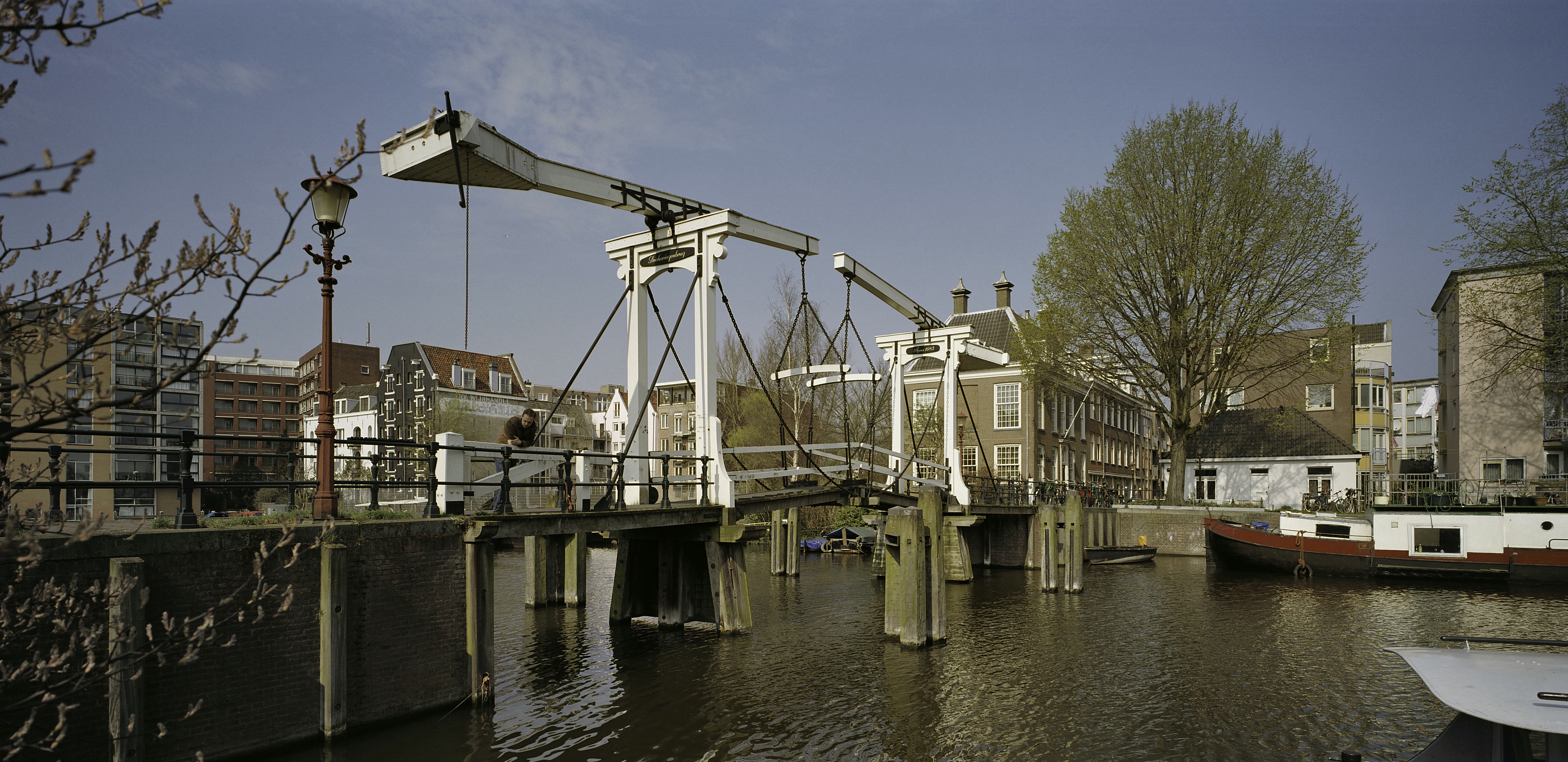 Drie Haringenbrug: Overzicht ophaalbrug (opmerking: Gefotografeerd voor Monumenten In Nederland Noord-Holland)